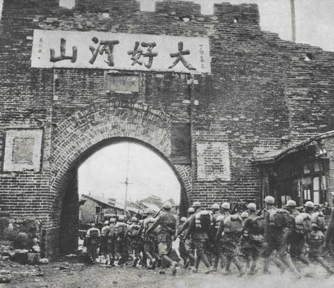 1945年抗日大反攻，八路军占领张家口